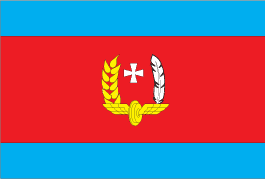 Прабор Гребінківського районну